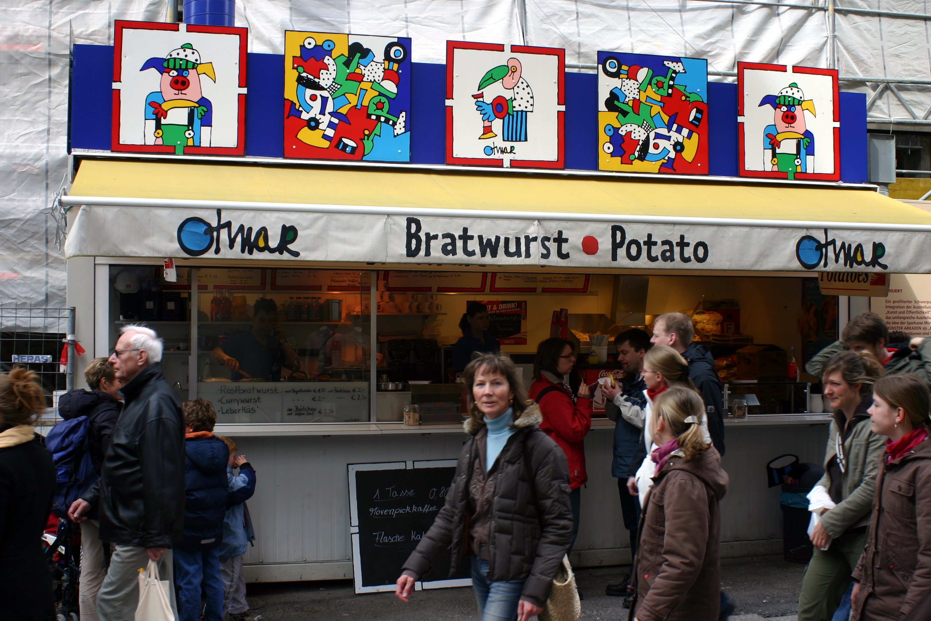 Otmar, die mit Bildern von Otmar Alt dekorierte Imbissbude in der Ludgeristraße in Münster